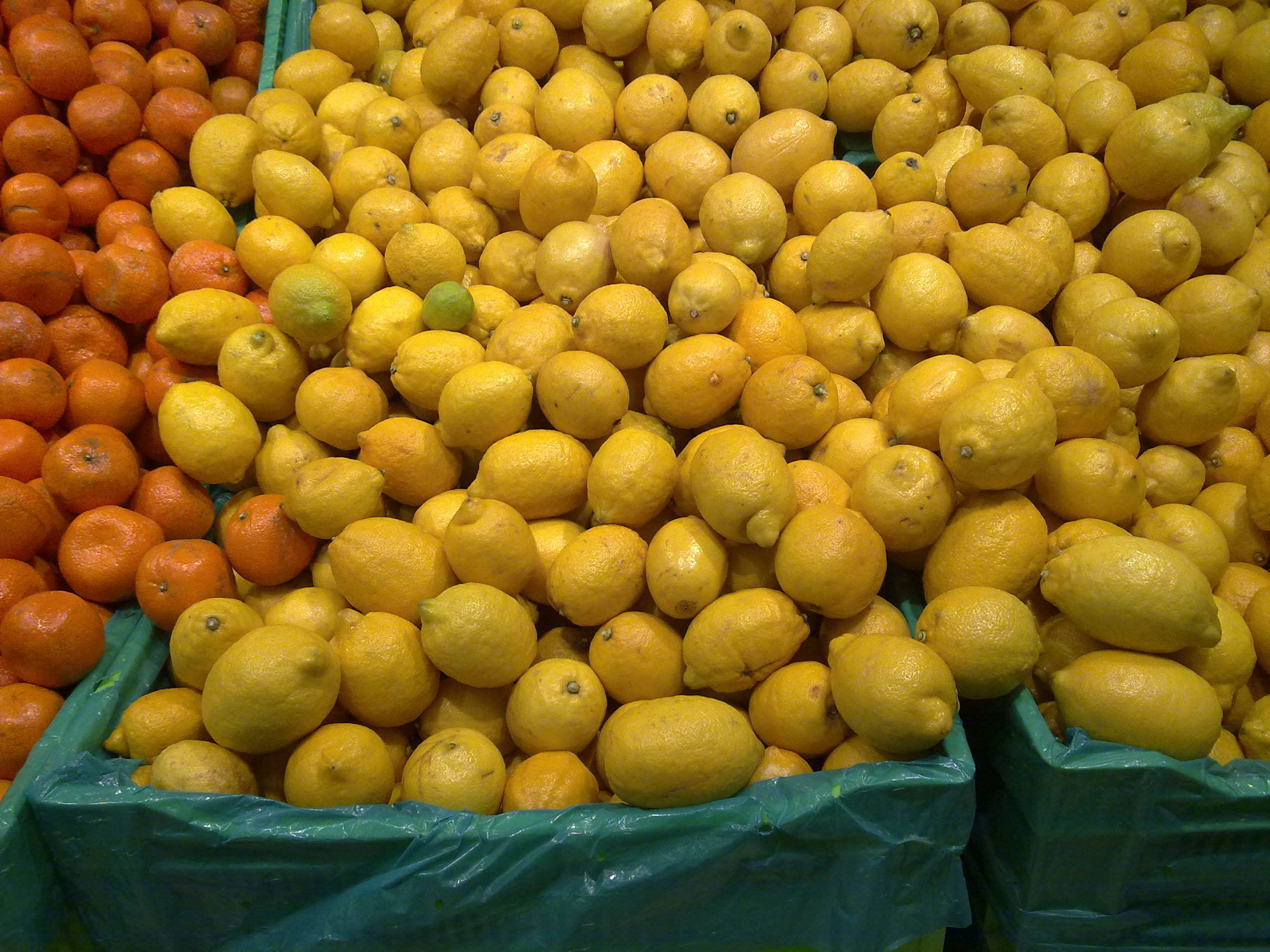 ചെറുനാരങ്ങ